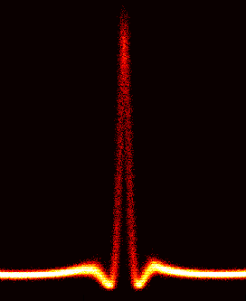 Profil temporel expérimental d'un soliton de Peregrine optique a son point de compression maximale. L'enregistrement a été effectué à l'aide d'un oscilloscope ultrarapide à échantillonnage optique. Plus de renseignements disponibles sur la publication : K. Hammani, B. Kibler, C. Finot, P. Morin, J. Fatome, J. M. Dudley, and G. Millot, "Peregrine soliton generation and breakup in standard telecommunications fiber," Opt. Lett. 36, 112-114 (2011).